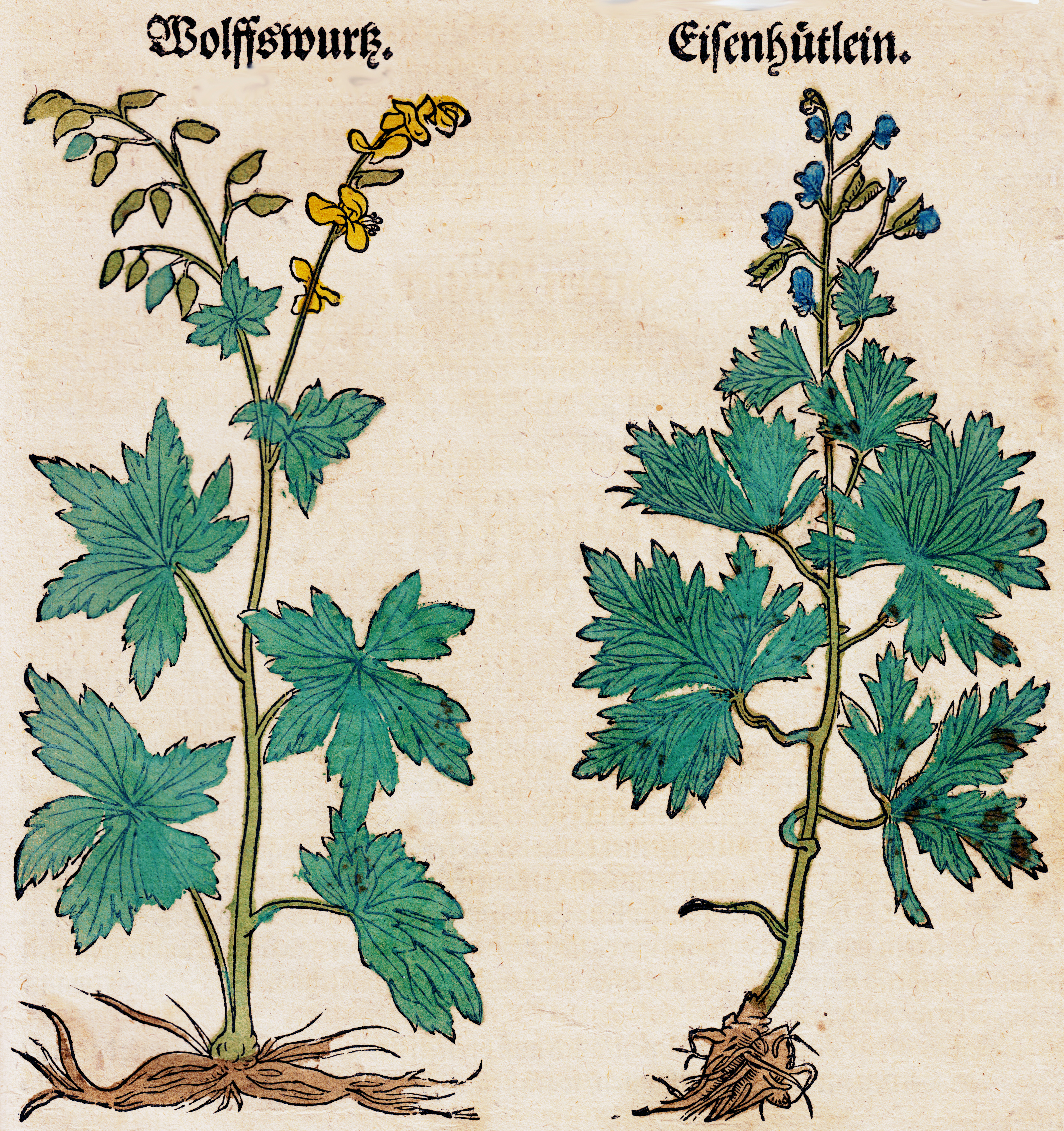 Abbildung von gelbem und blauem Eisenhut